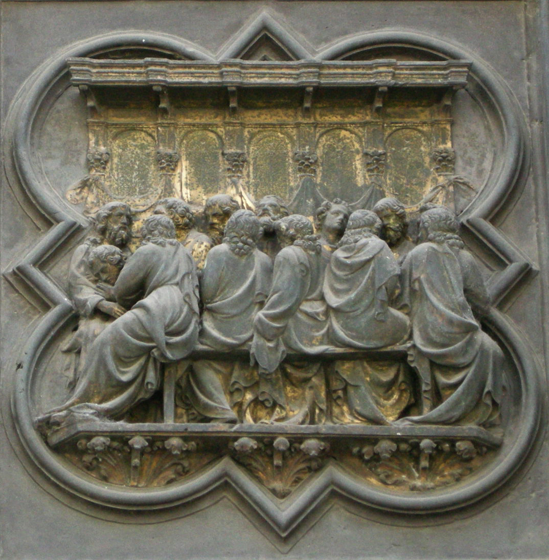 2 Ultima cena3